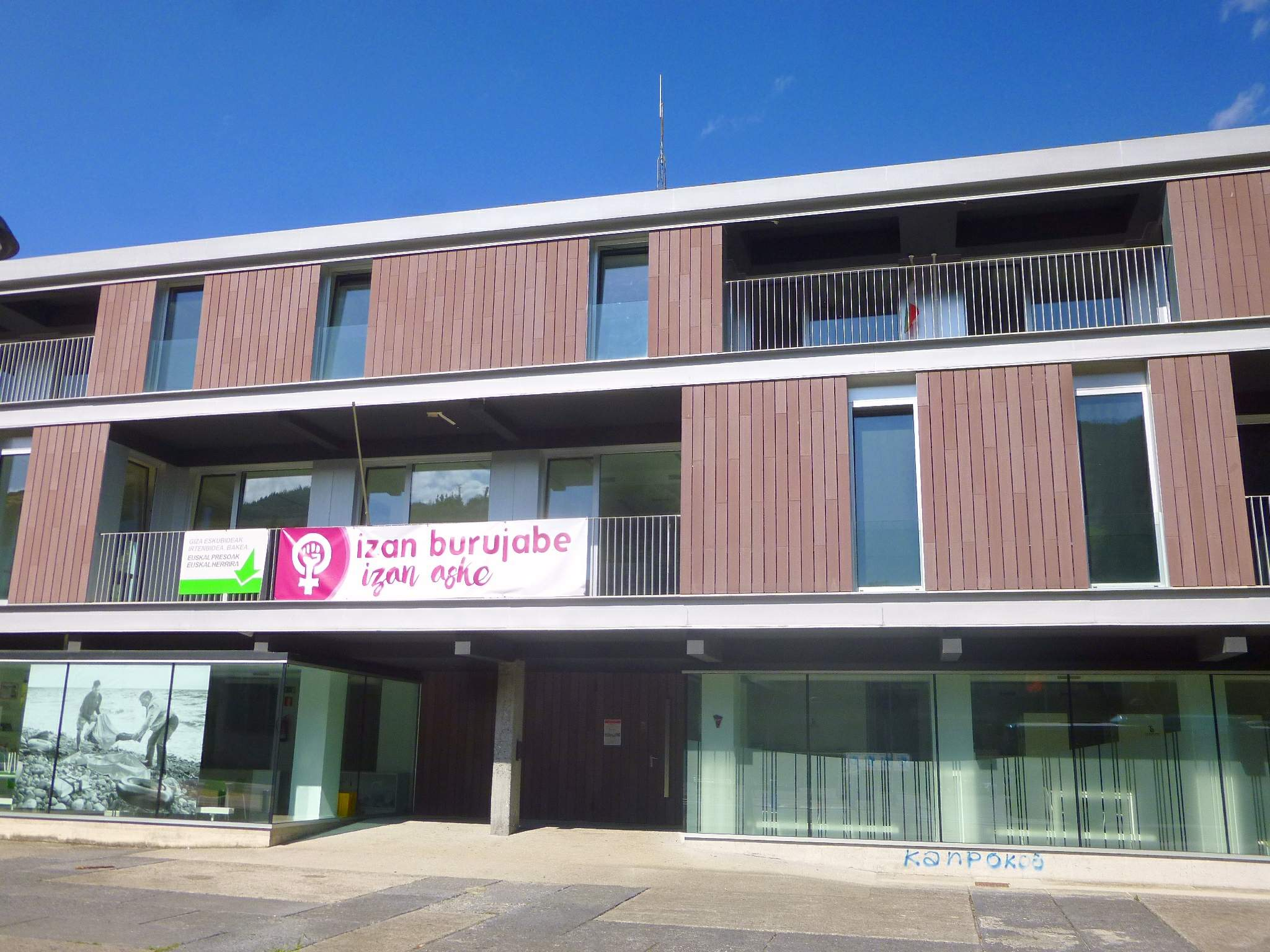 Ayuntamiento de Itsasondo (Guipúzcoa)